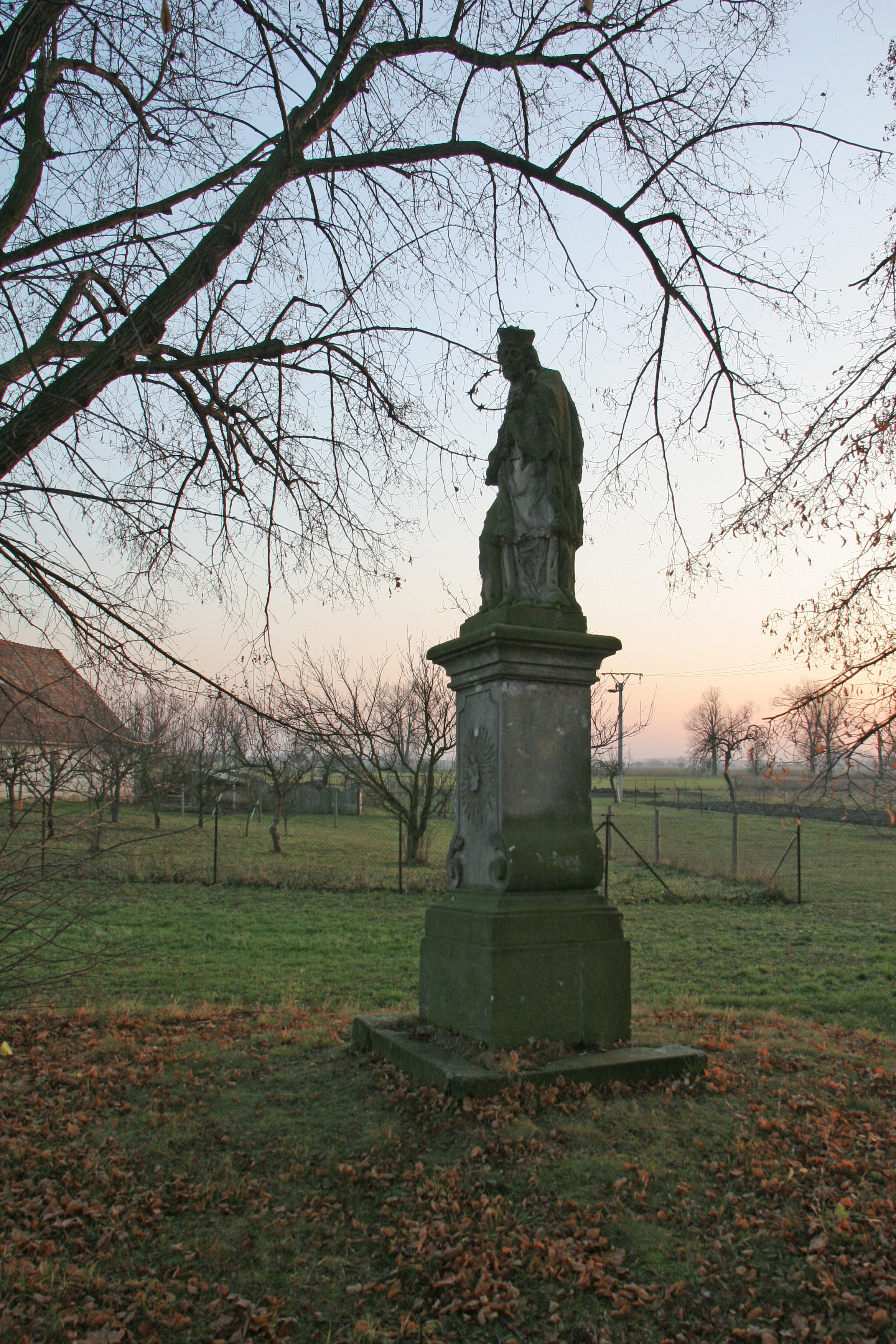 Socha sv. Jana Nepomuckého (Komárov), u kostela, Komárov